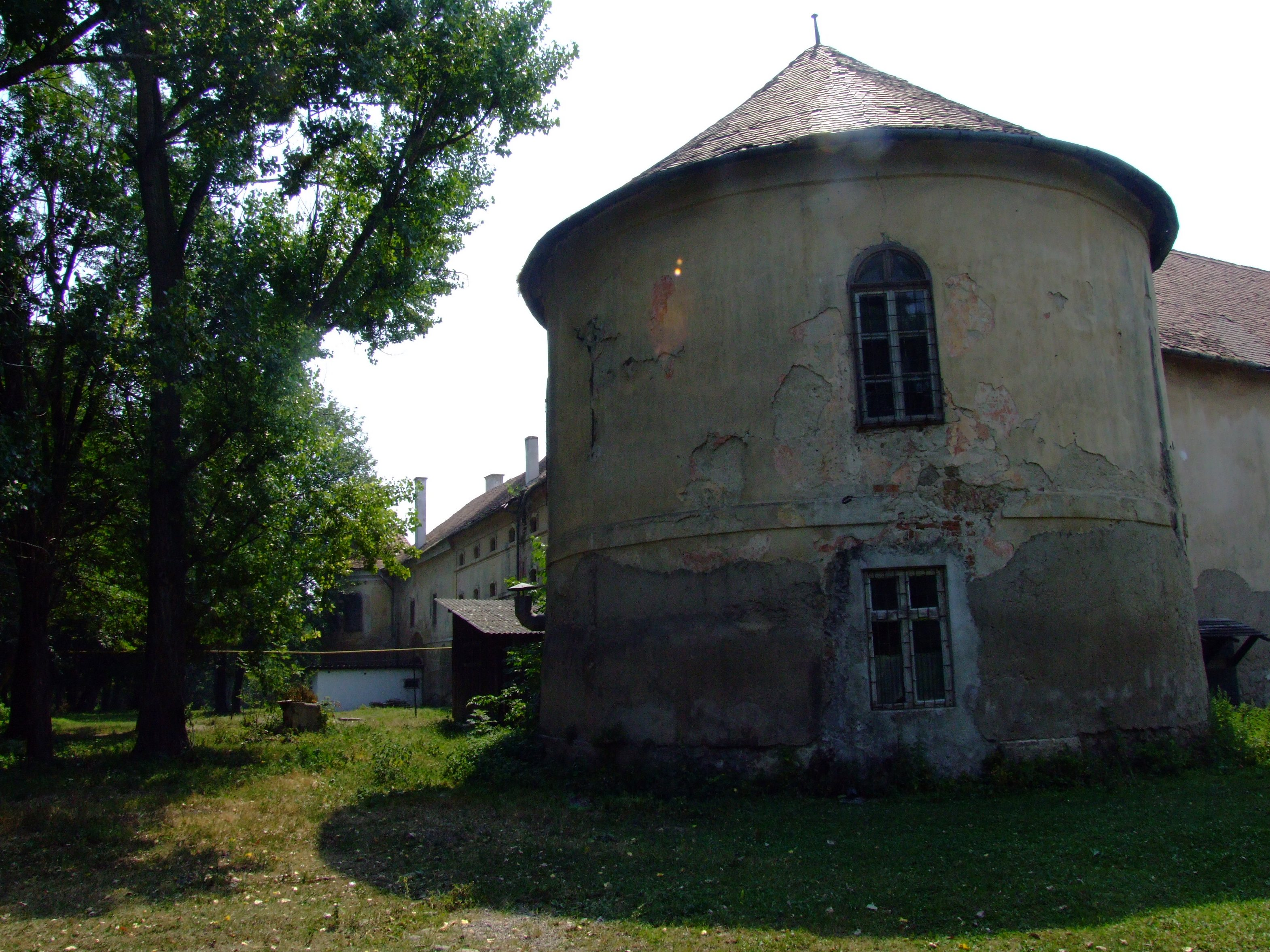 Замъкът в Джилъу.